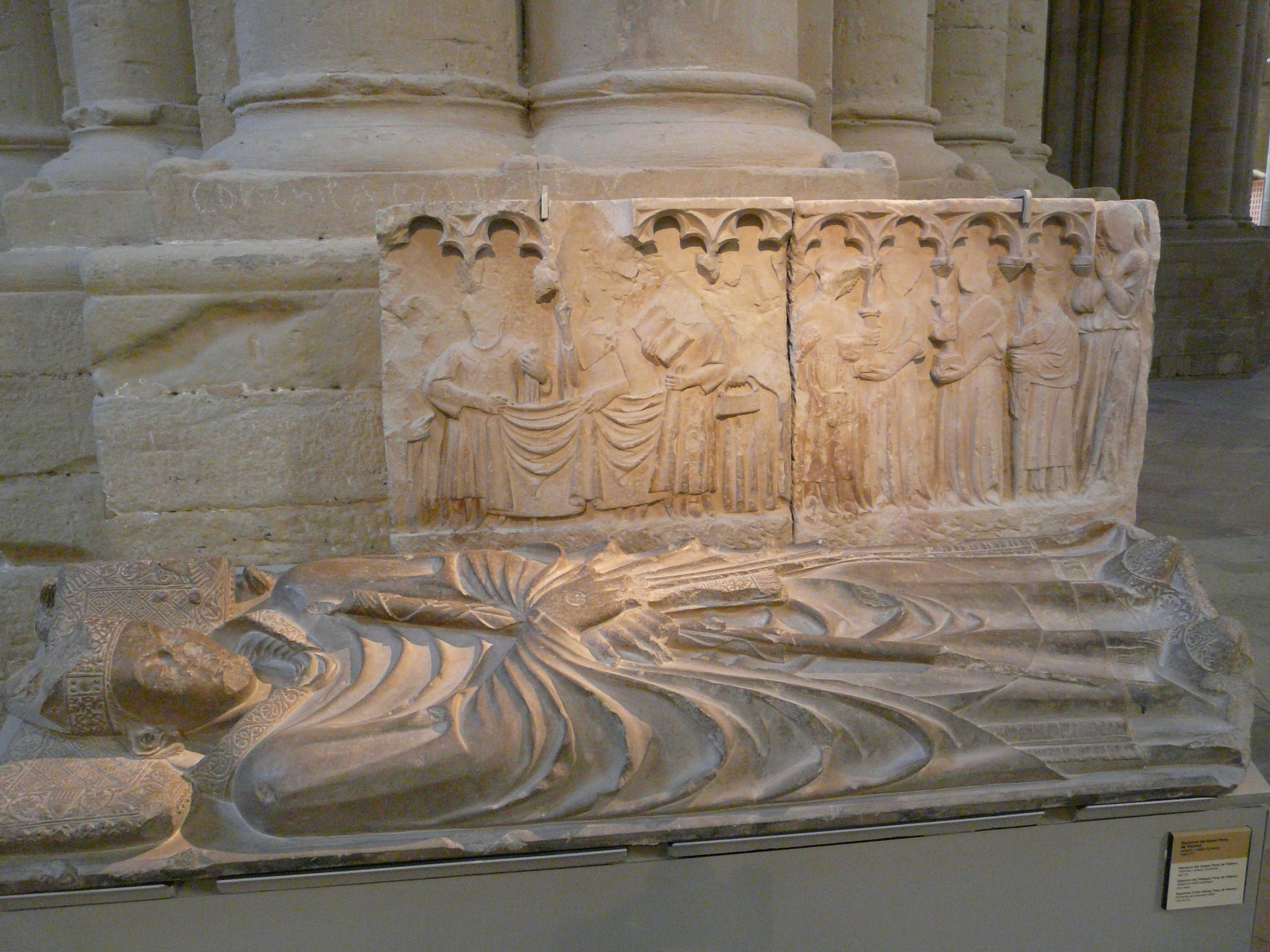 Seu Vella (Lleida) Object location41° 37′ 05.31″ N, 0° 37′ 37.13″ E